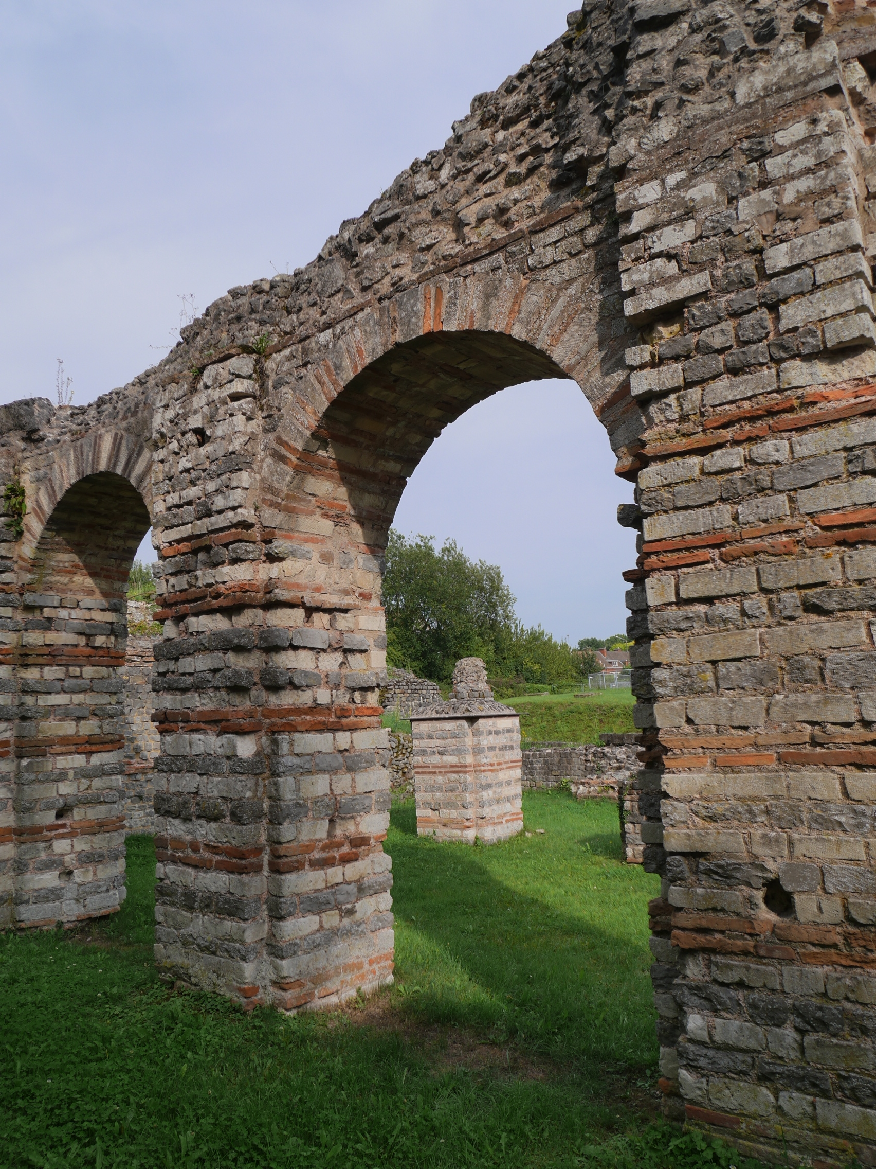 Piliers du crypto-portique de Bavay.